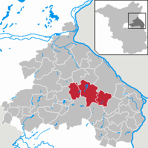 Amt Neuhardenberg in Brandenburg (Country) - District Märkisch-Oderland